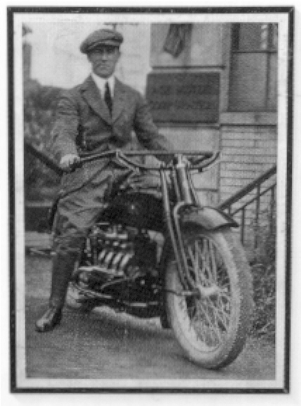 William G. Henderson sitting on a Henderson motorcycle.